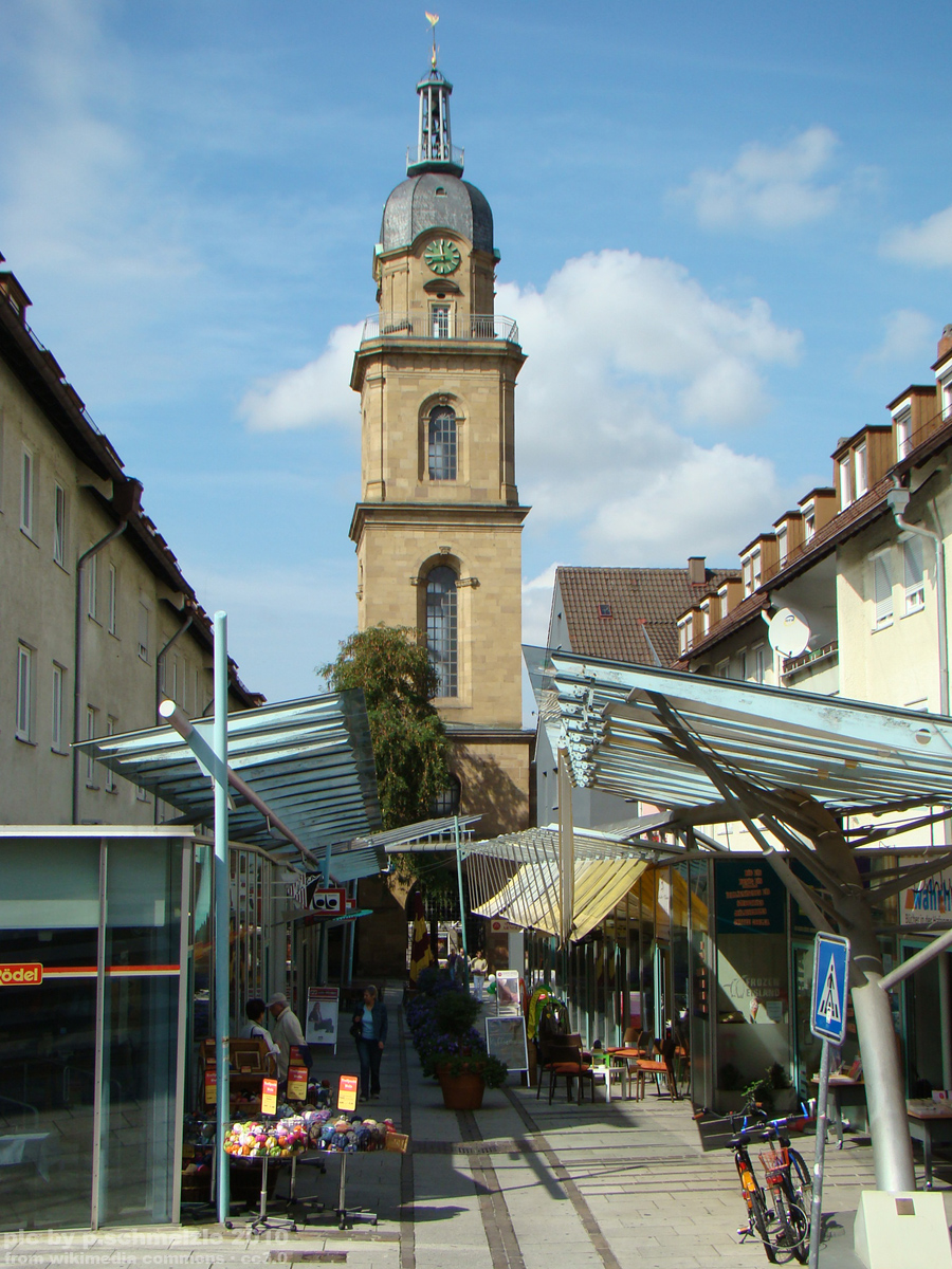 Hafenmarktpassage (Gustav-Binder-Straße) mit Hafenmarktturm in Heilbronn. Foto von 2010.